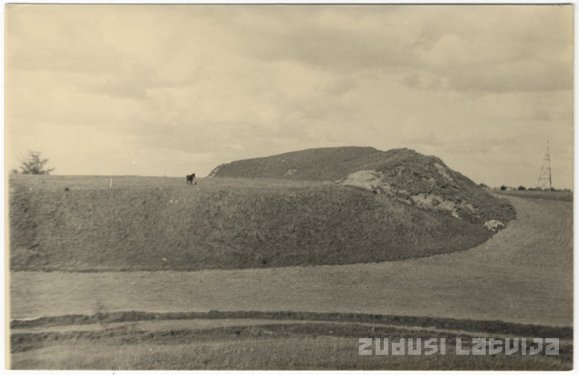 Daugmale linnamägi